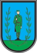 Coat of arms of Verternik, near Novi Sad, Vojvodina (Serbia)/Blason de Veternik, près de Novi Sad, Voïvodine (Serbie)